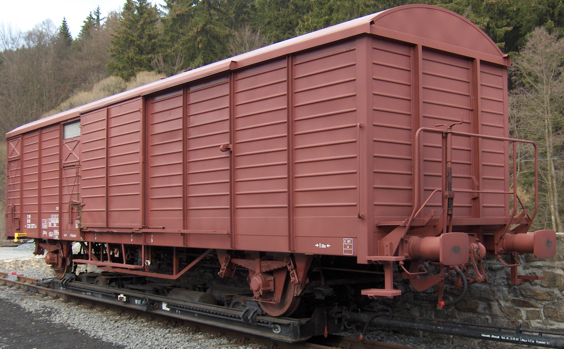 Mannschaftstransportwagen Hbs der DR, GSNR 2301, Nummer 230 1377, mit Handbremse und eckigen Puffern,m gebaut im Raw Leipzig ab 1988